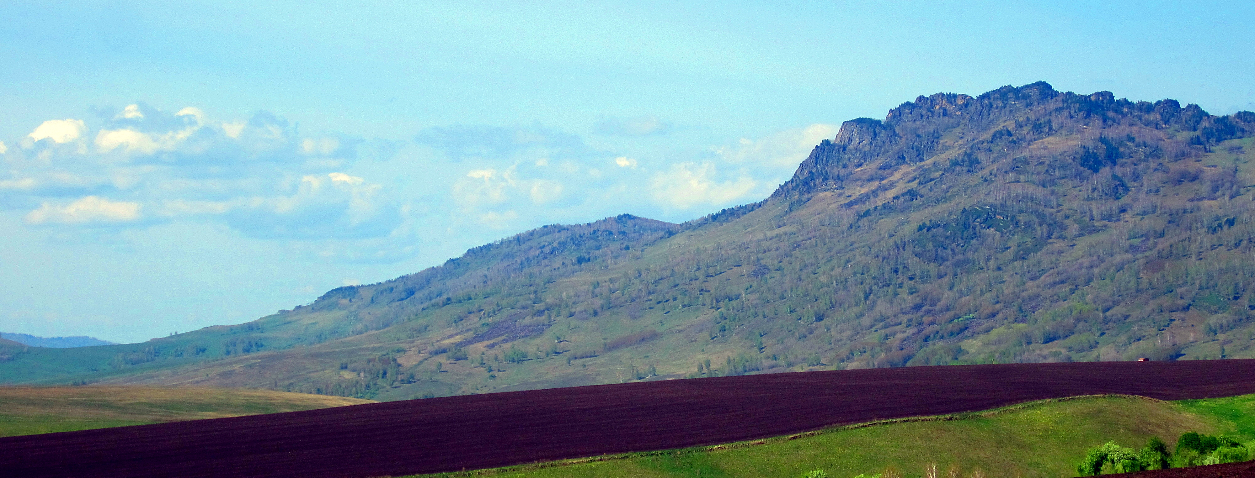 Гора Бобырган: В 12 км к востоку от с. Колово. Географическое: северный фас Алтая. Координаты: 52 град. 04 мин. 22,38 сек. с.ш. 85 град. 44 мин. 25,13 сек. в.д., 52 град. 04 мин. 18,71 сек. с.ш. 85 град. 44 мин. 57,56 сек. в.д., 52 град. 03 мин. 36,64 сек. с.ш. 85 град. 44 мин. 22,38 сек. в.д., 52 град. 03 мин. 45,76 сек. с.ш. 85 град. 43 мин. 52,67 сек. в.д., координаты вершины 52 град. 03 мин. 45,65 сек. с.ш. 85 град. 44 мин. 09,39 сек. в.д,Советский район, Алтайский край This image is related to the protected area of Russia number 2210141